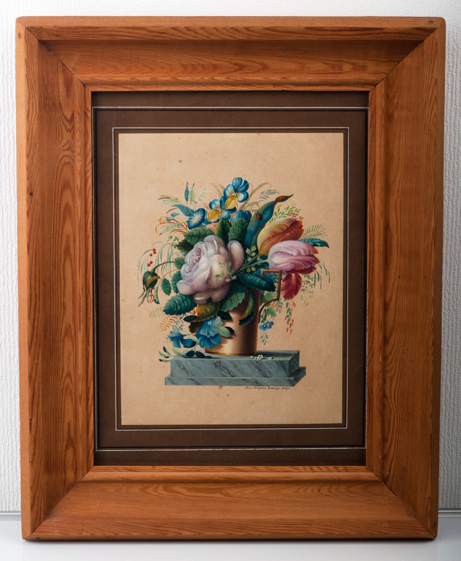 Автор: украинский художник XIX века Проспер Горский. Акварель. 1837 г. Размеры: 23 х 30